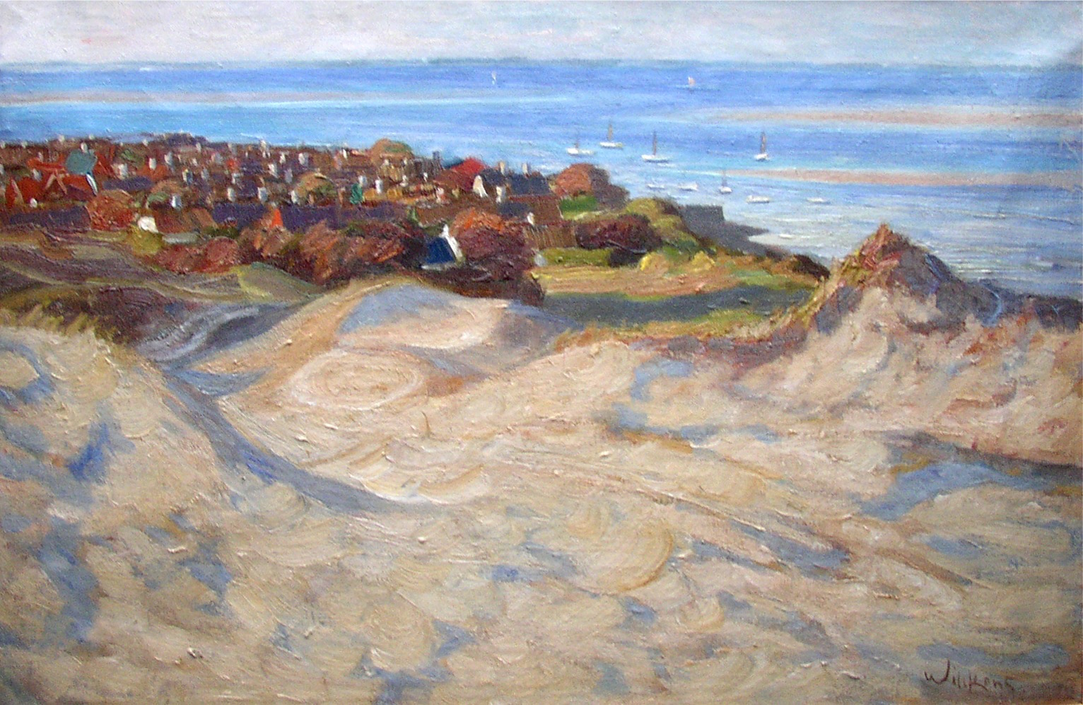 ukendt titel Unknown motiv formentlig fra Fanø